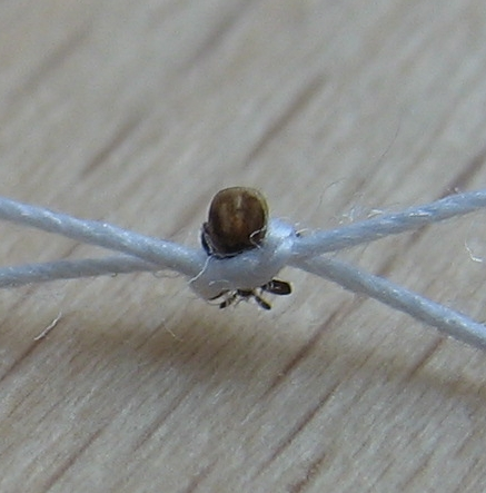 Zecke in Zeckenschlinge. Der Faden hat einen Durchmesser von 0,35 mm, die Zecke ist 1,5 mm lang und kann daher leicht mit einem kleinen vertrockneten Blutstropfen verwechselt werden.